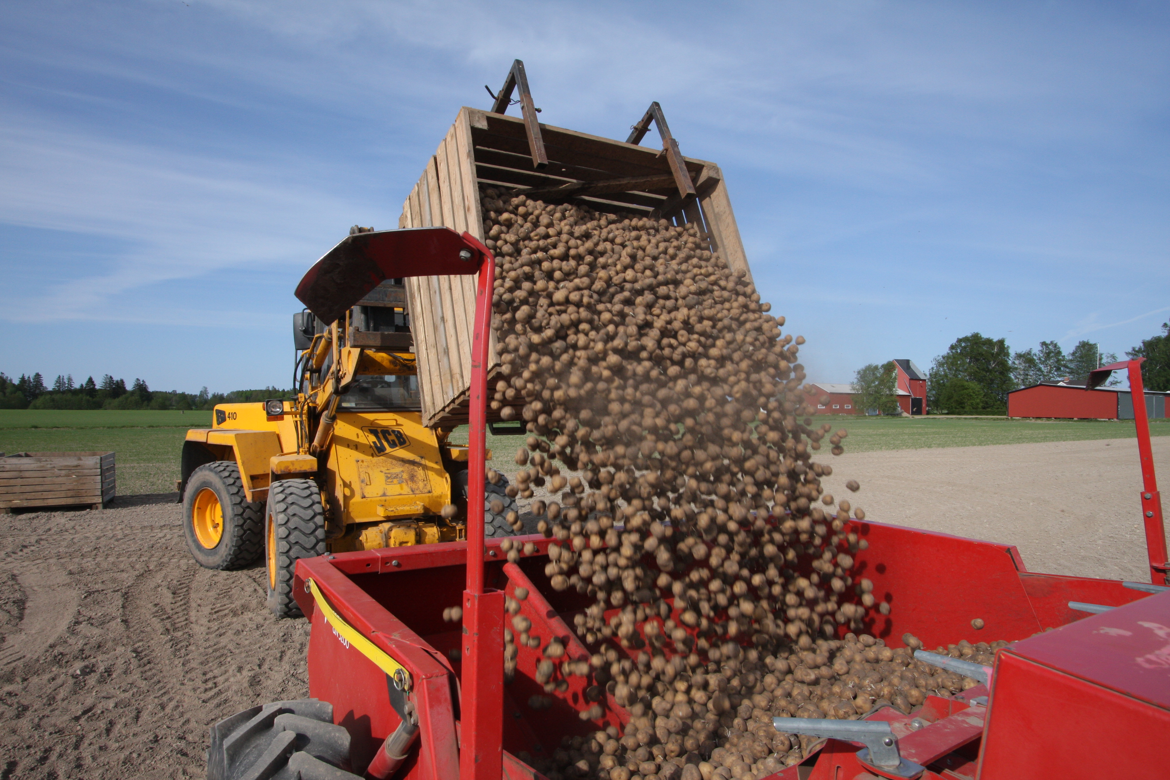 Verladen von Pflanzkartoffeln mit einem JCB-Radlader in eine Kverneland-Legemaschine UN 3200 (Underhaug). Amflora-Anpflanzung im Feldversuchsanbau 2008 in Schweden (Amflora ist eine gentechnisch veränderte Stärke-Kartoffelsorte).